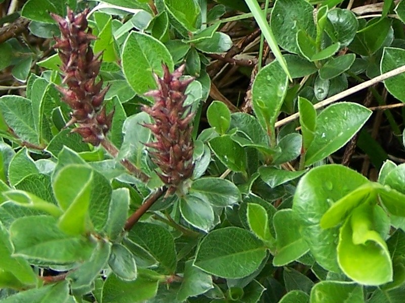 Salix alpina(pl. wierzba alpejska), Tatra Mountains, Czerwone Wierchy